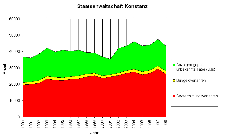 Grafik des Geschäftsbelastung der Staatsanwaltschaft Konstanz bis zum Jahr 2008.